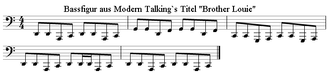 Bassfigur aus Modern Talkings Titel "Brother Louie